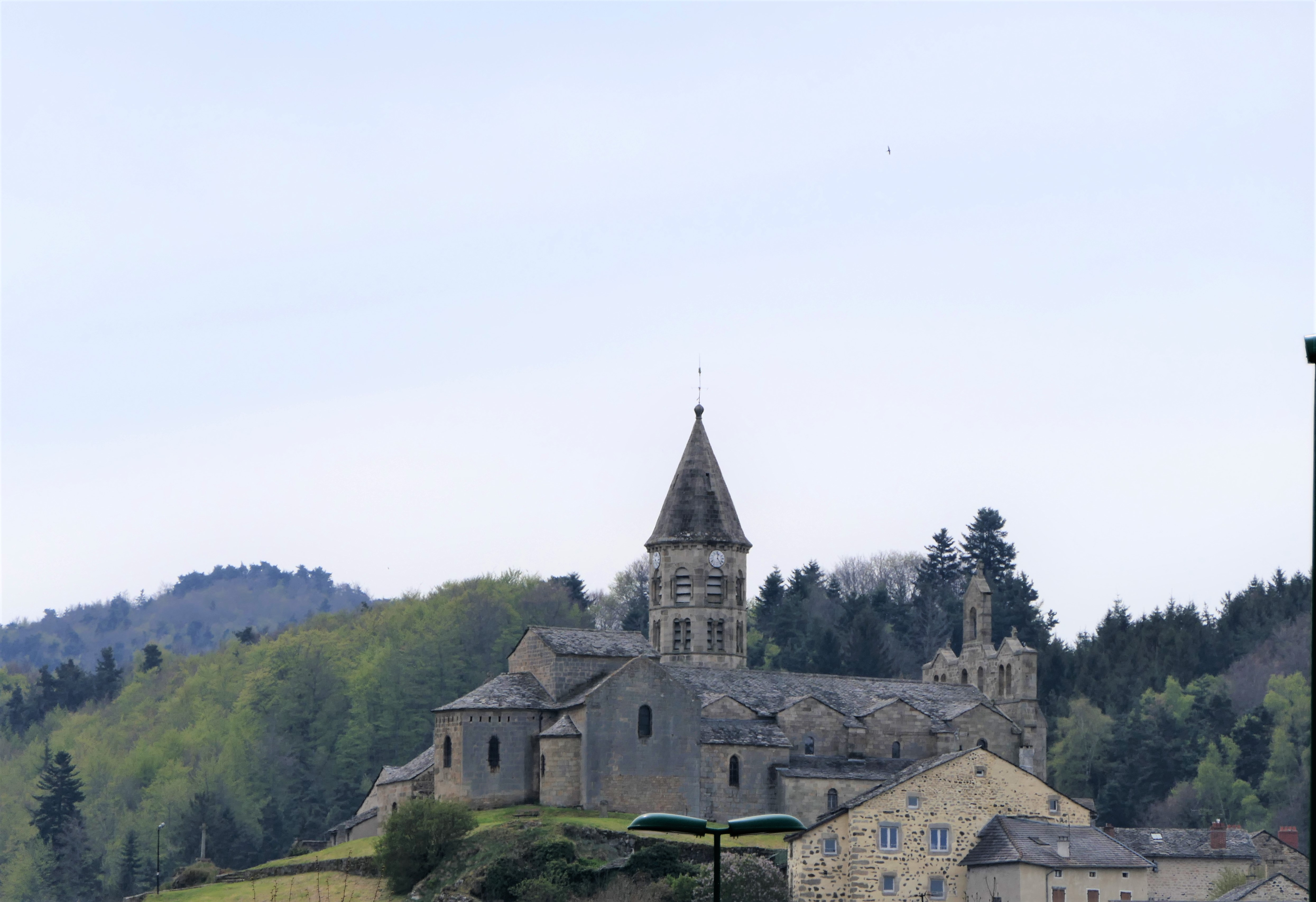 Eglise Saint-Julien de Saint-Julien-Chapteuil, vue générale de l'église